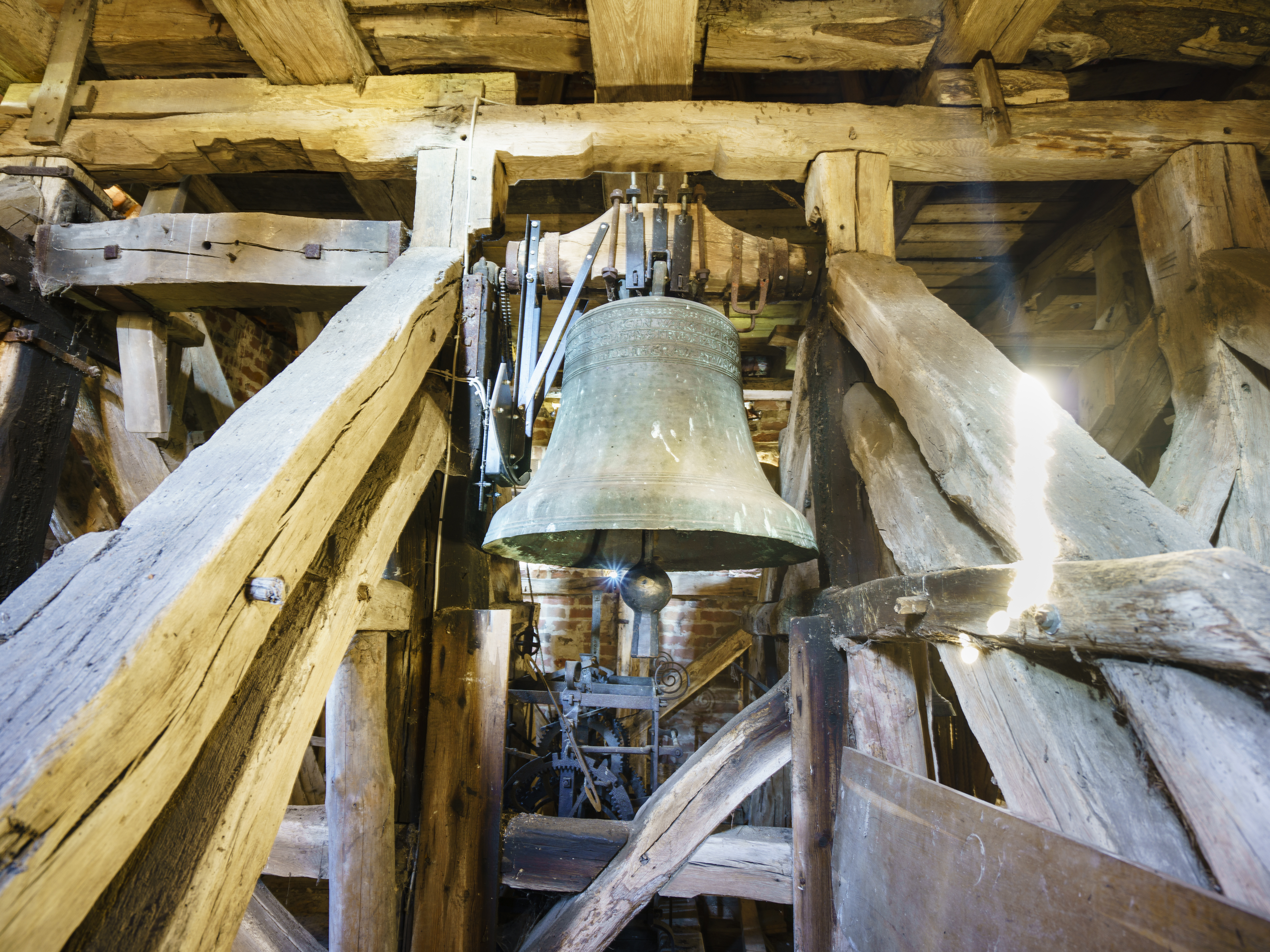 Dorfkirche Moisall - Glocke von 1551